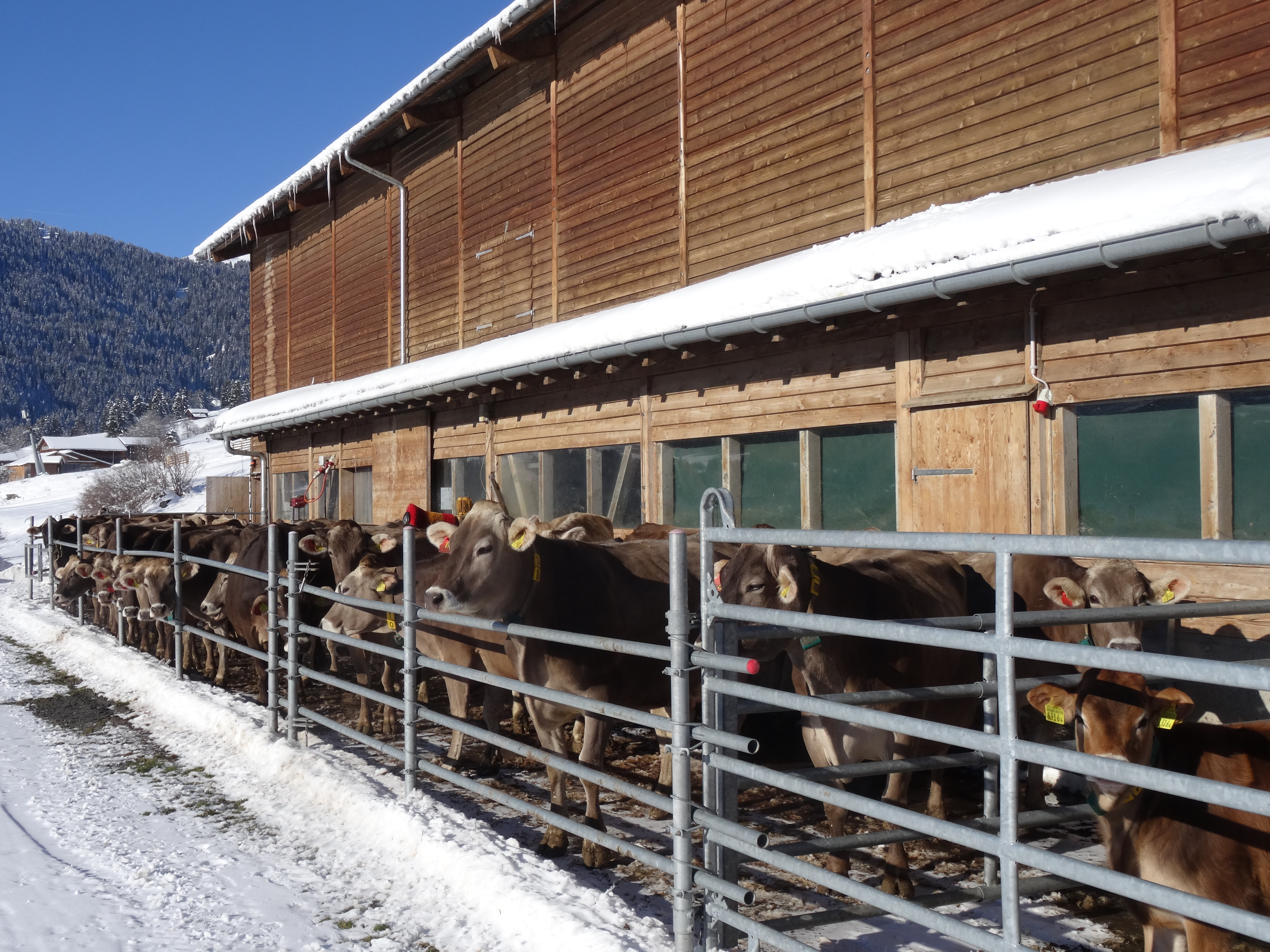 Kühe vor ihrem Stall in Falera